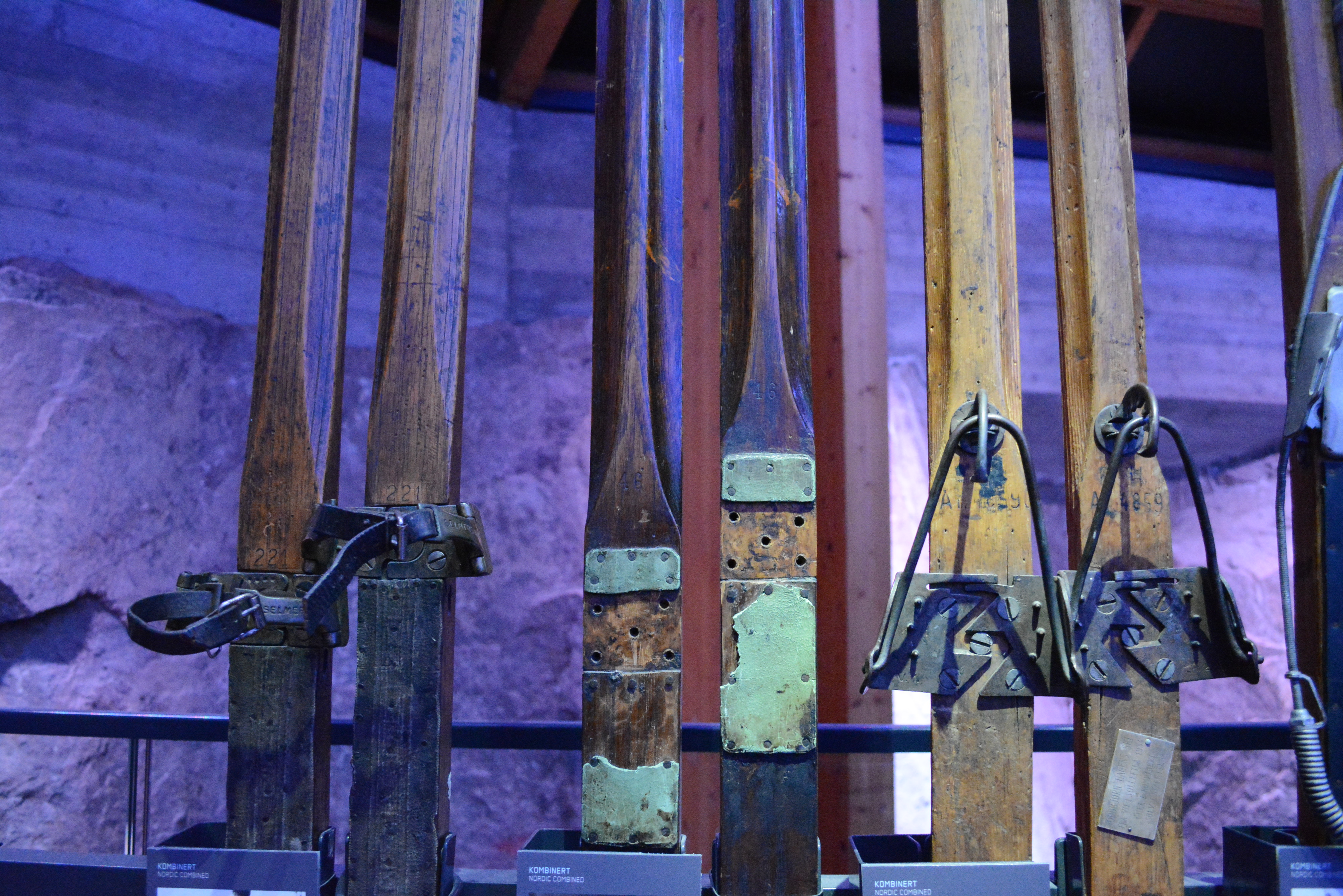 Holmenkollen, Oslo